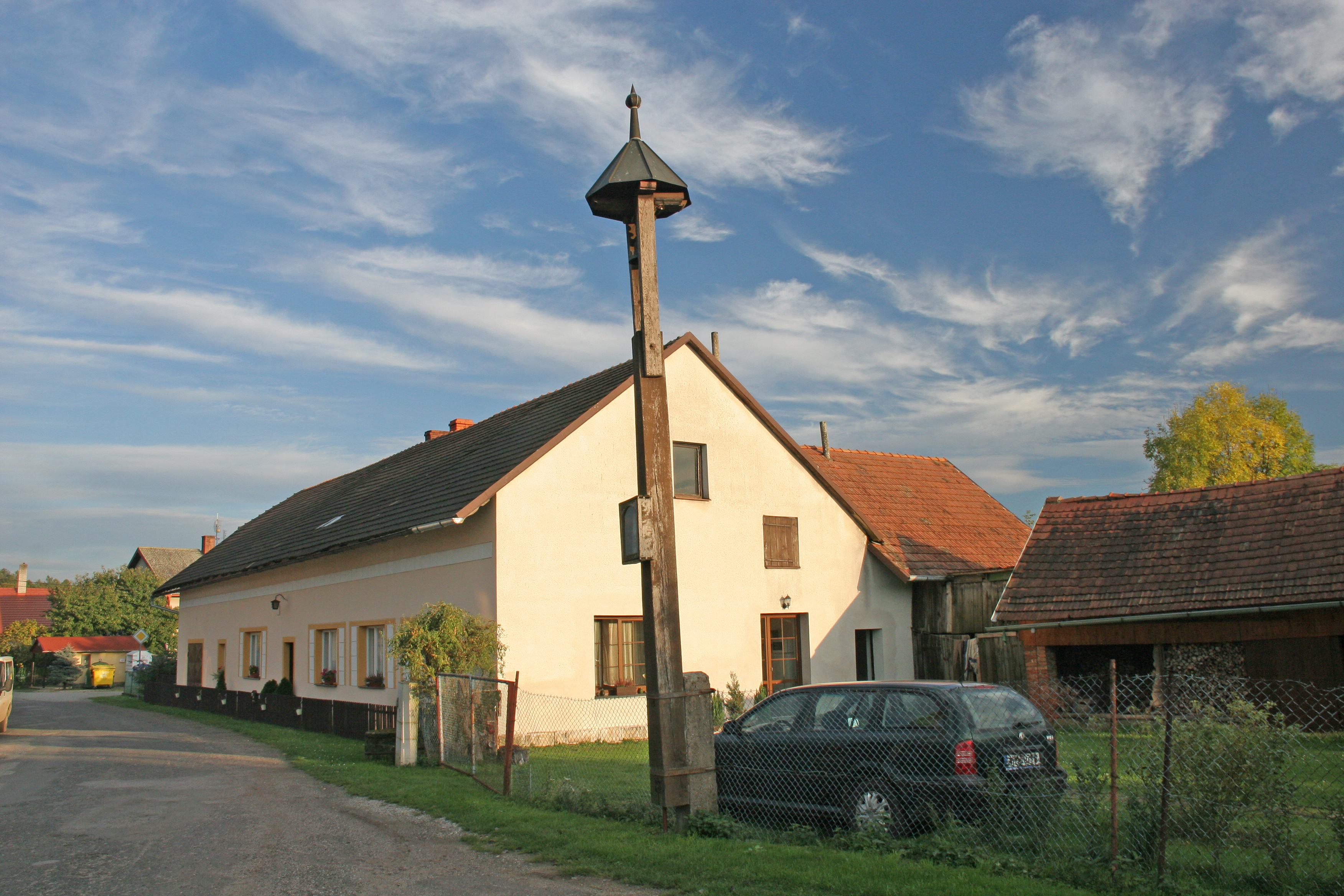 Batín zvonička